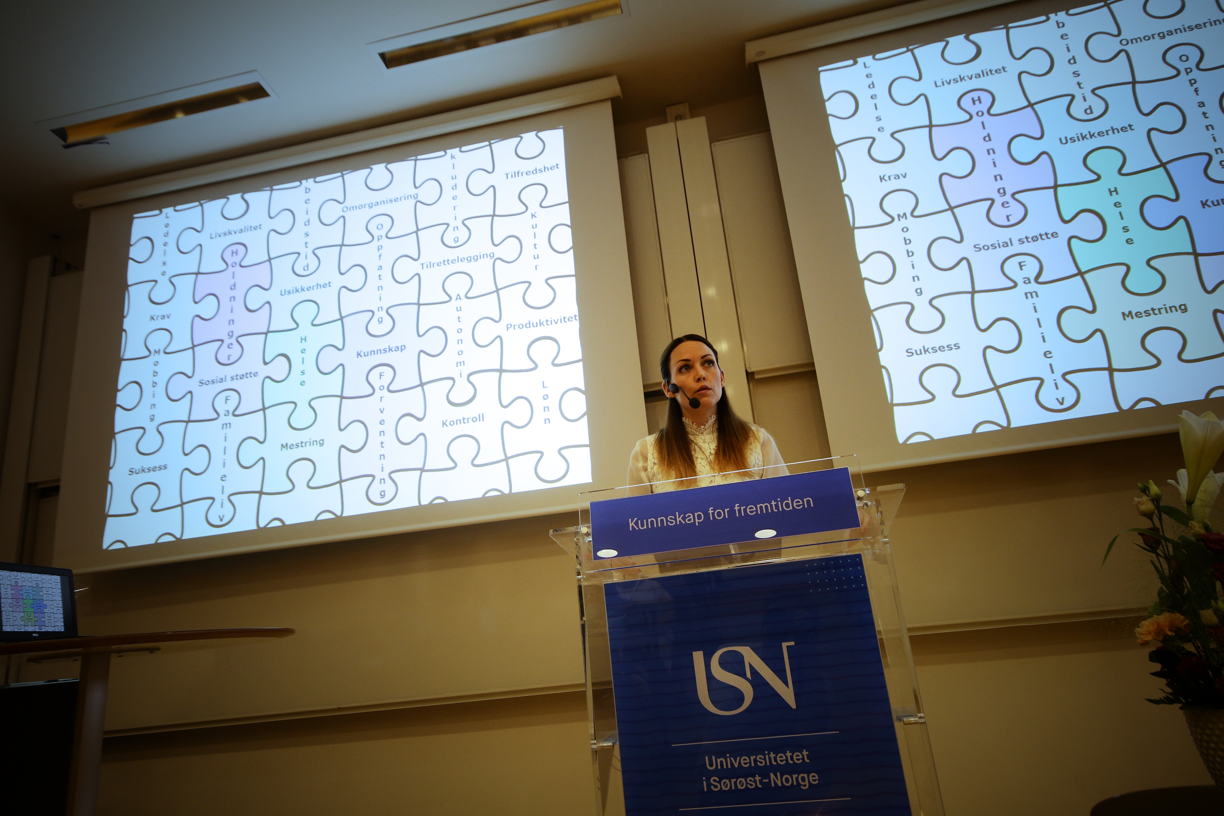 Tone Langjordet Johnsen disputerer 01.06.18., som den første til å gjøre dette ved Universitetet i Sørøst-Norge.